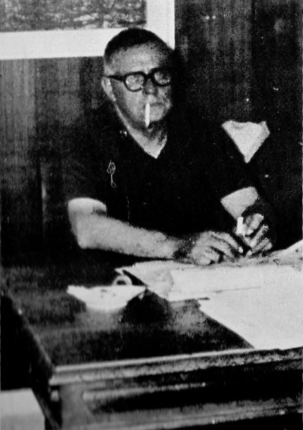 foto di mio padre nel suo studio 1965